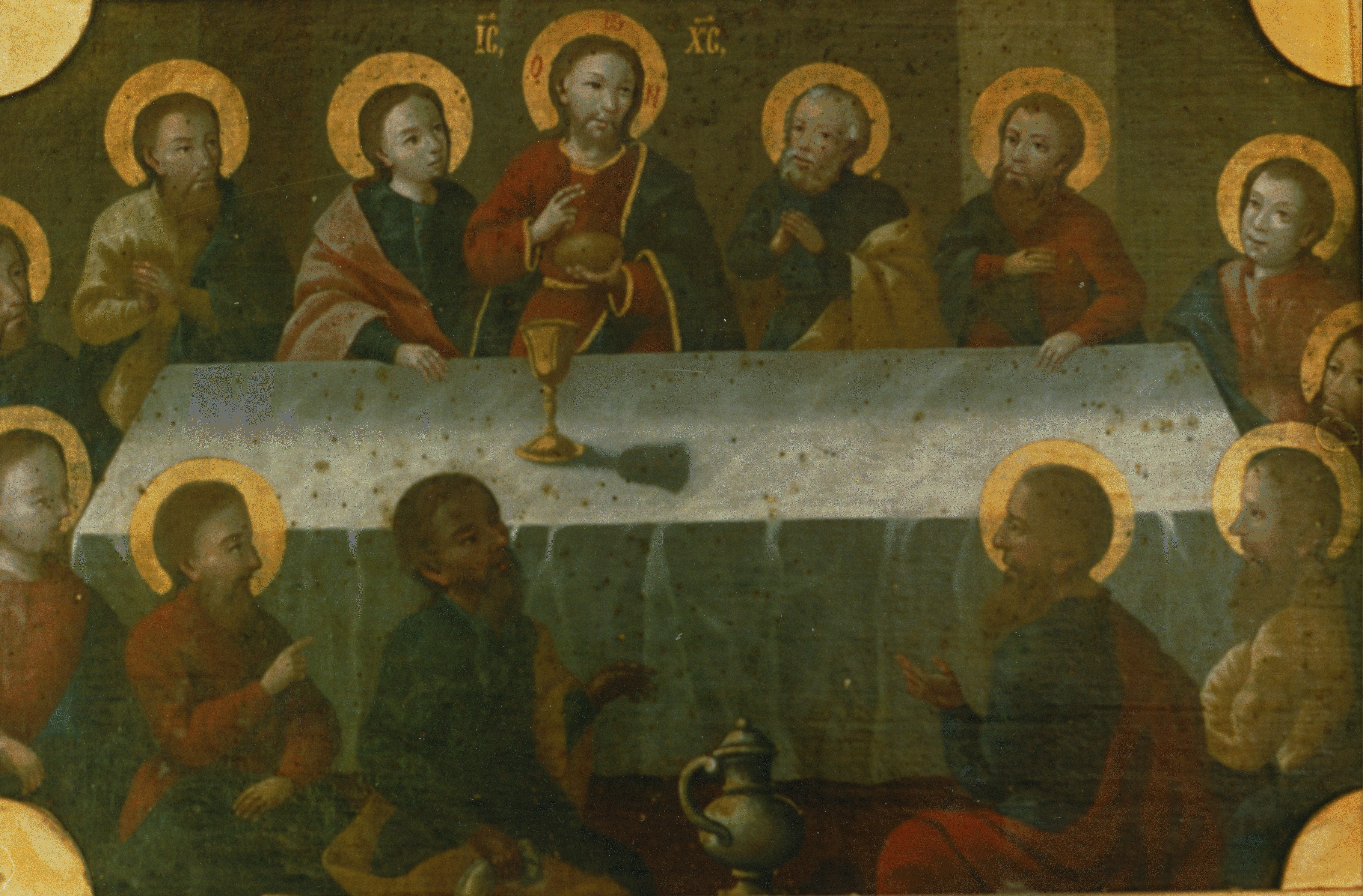 Ikona Poslednej večere z ikonostasu baziliánskeho monastiera na Bukovej Hore pri Stropkove z 18. storočia. Photo taken by Jozafát Vladimír Timkovič, OSBM